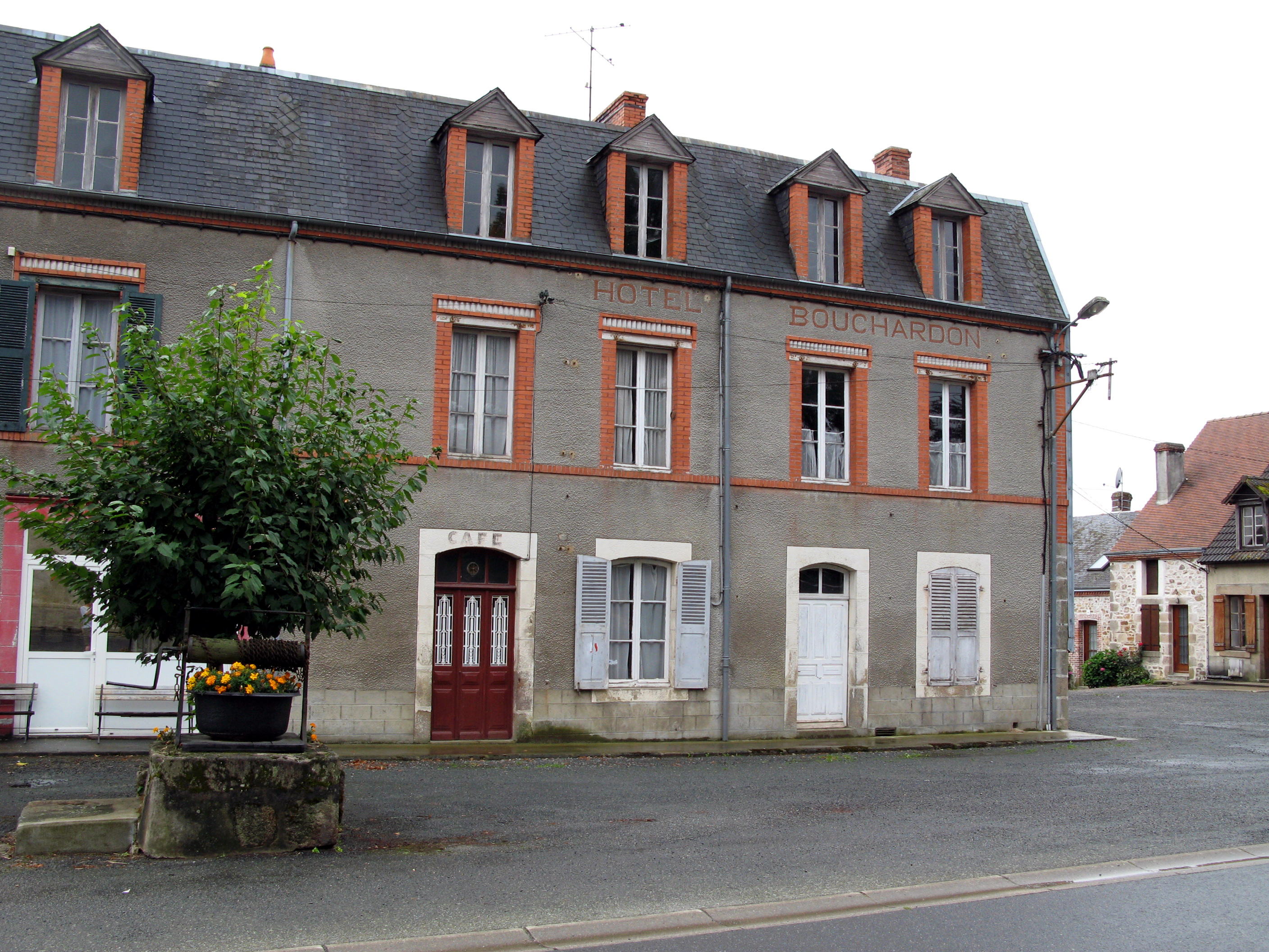 Nouziers (Creuse, France) - L'ancien hôtel Bouchardon (sur le même côté de la rue que la mairie) se trouve face à l'église. . .